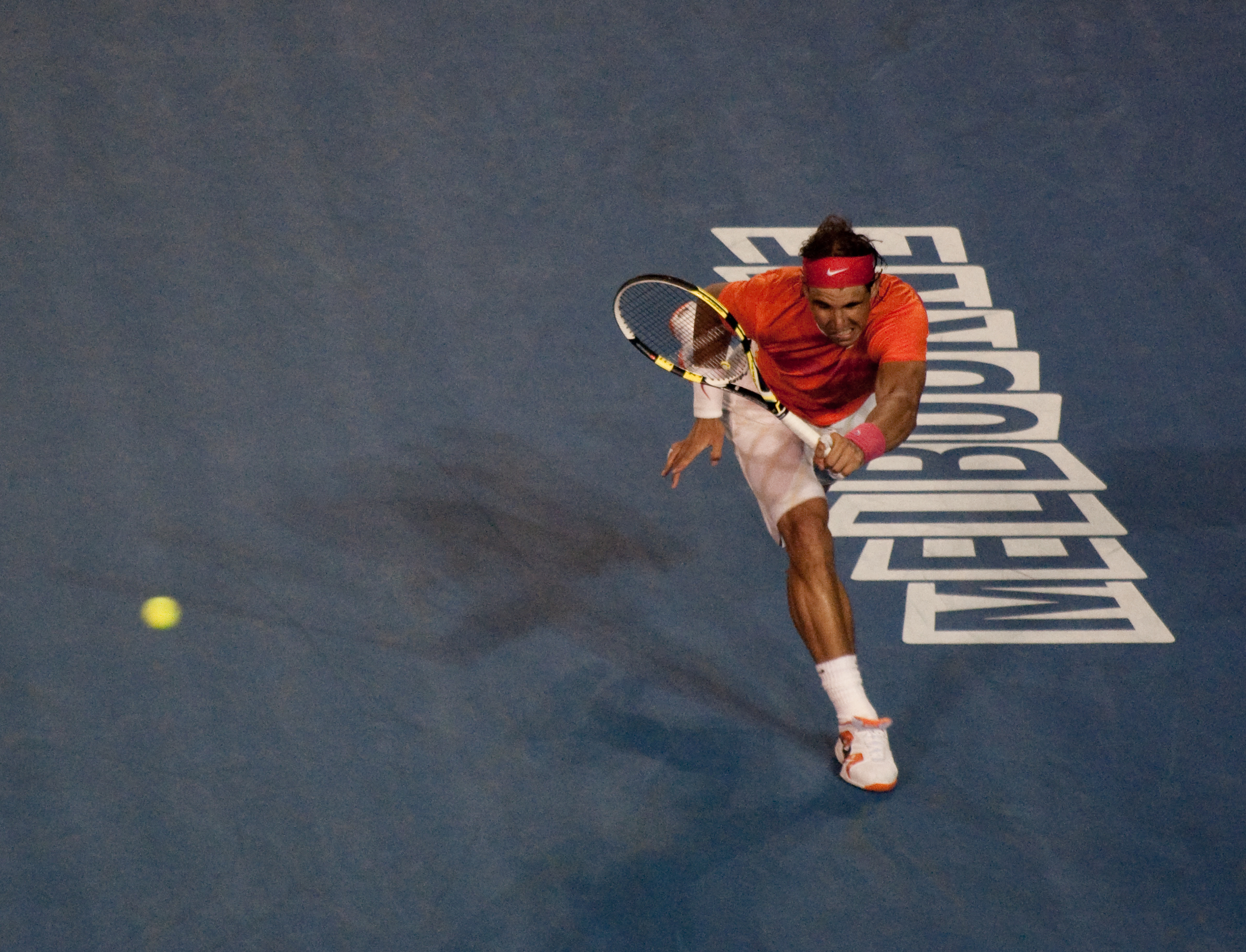 Australian Open 2010 Quarterfinals Nadal Vs Murray